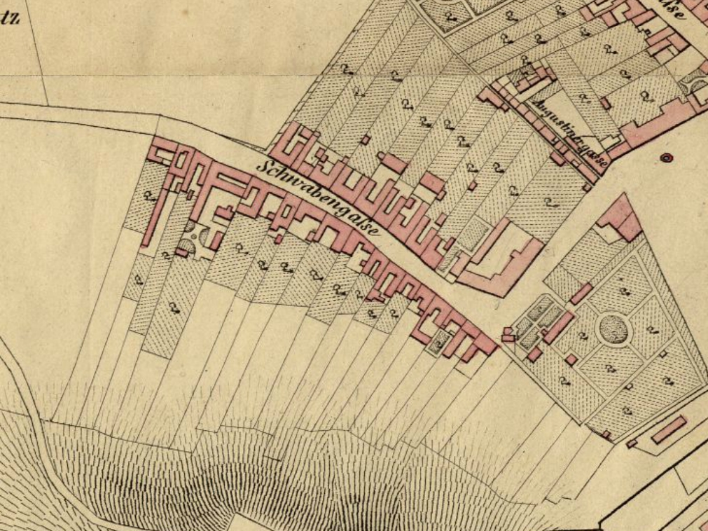 Švábka. Doležalův situační plán města Brna 1:5 760 z roku 1858